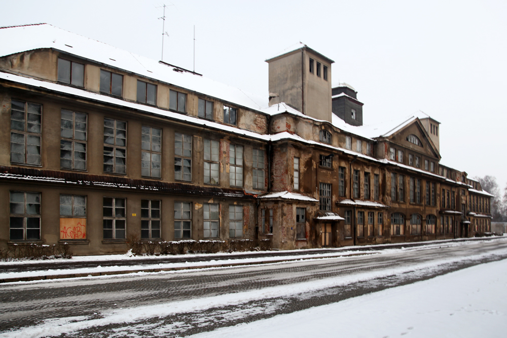 Königliches Feuerwerkslaboratorium Radeberg, Speisesaalgebäude und Zündermontage